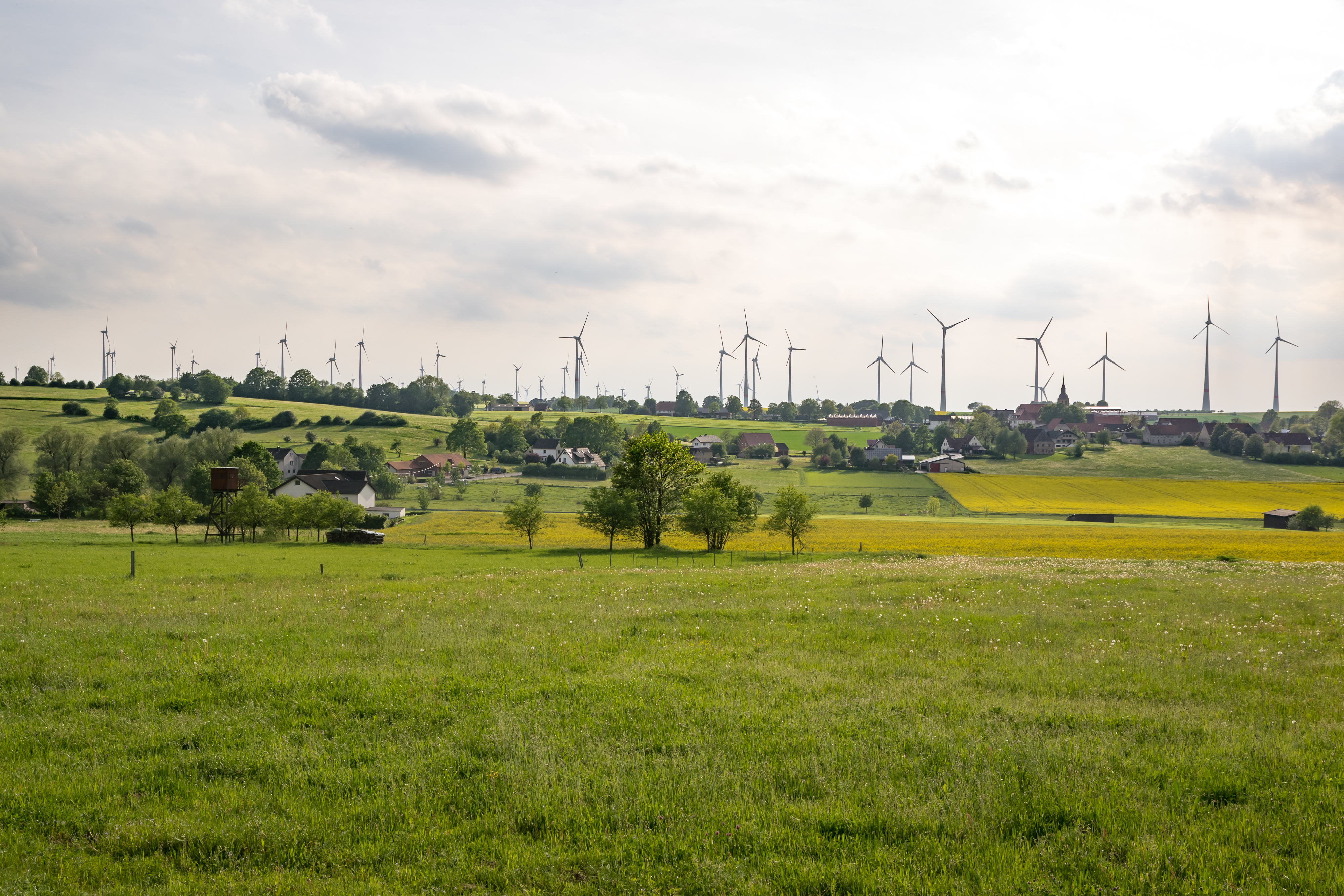 LSG Naturpark Eggegebirge und Teutoburger Wald östlich von Lichtenau-Asseln